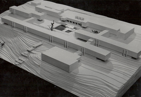 GJGT - plánovaná podoba školy